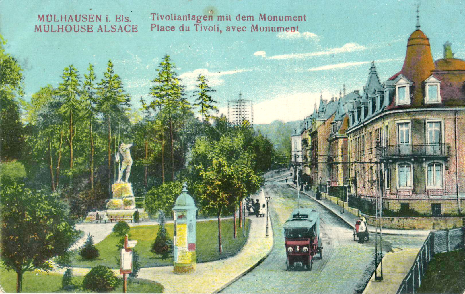 Carte postale ancienne éditée par "Kunstverlag J. Kuntz, Gebweiller : MULHOUSE - Place du Tivoli, avec Monument. Vue d(une motrice du trolleybus de Mulhouse